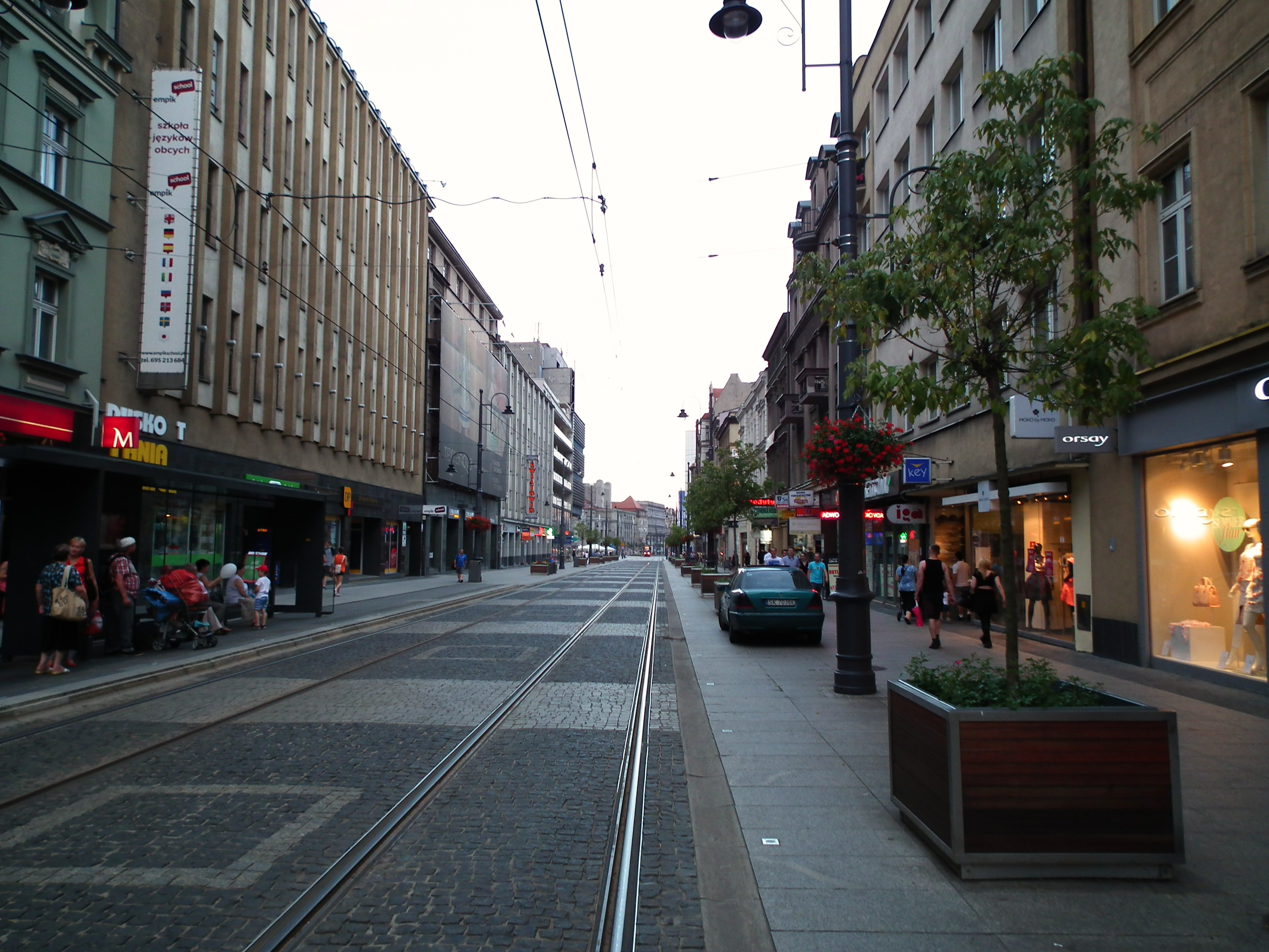 Ulica 3 Maja w Katowicach.